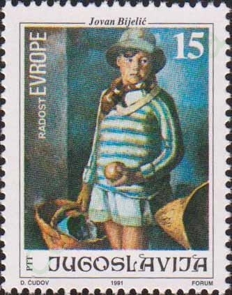 Jovan Bijelić, Michel YU 2507 stamp